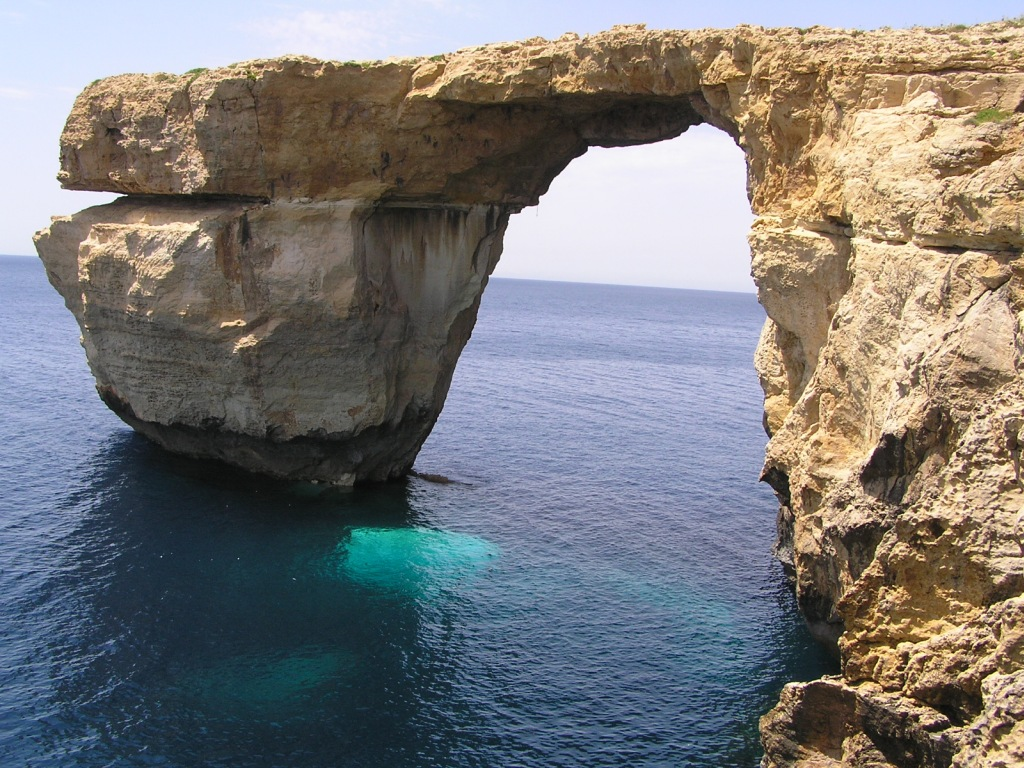 Azure Window - po częściowym zawaleniu 15-06-2012